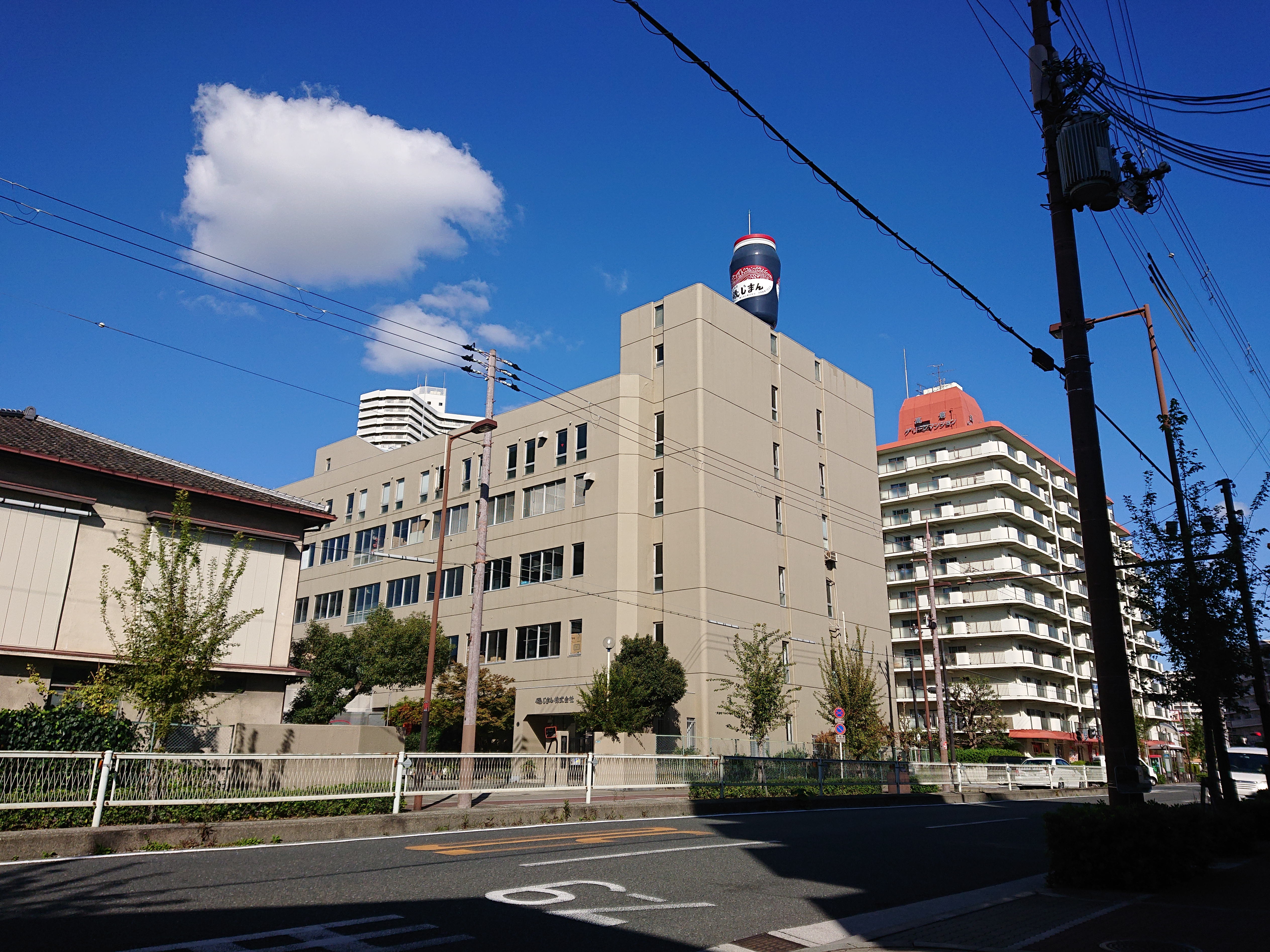 大阪市にある磯じまん